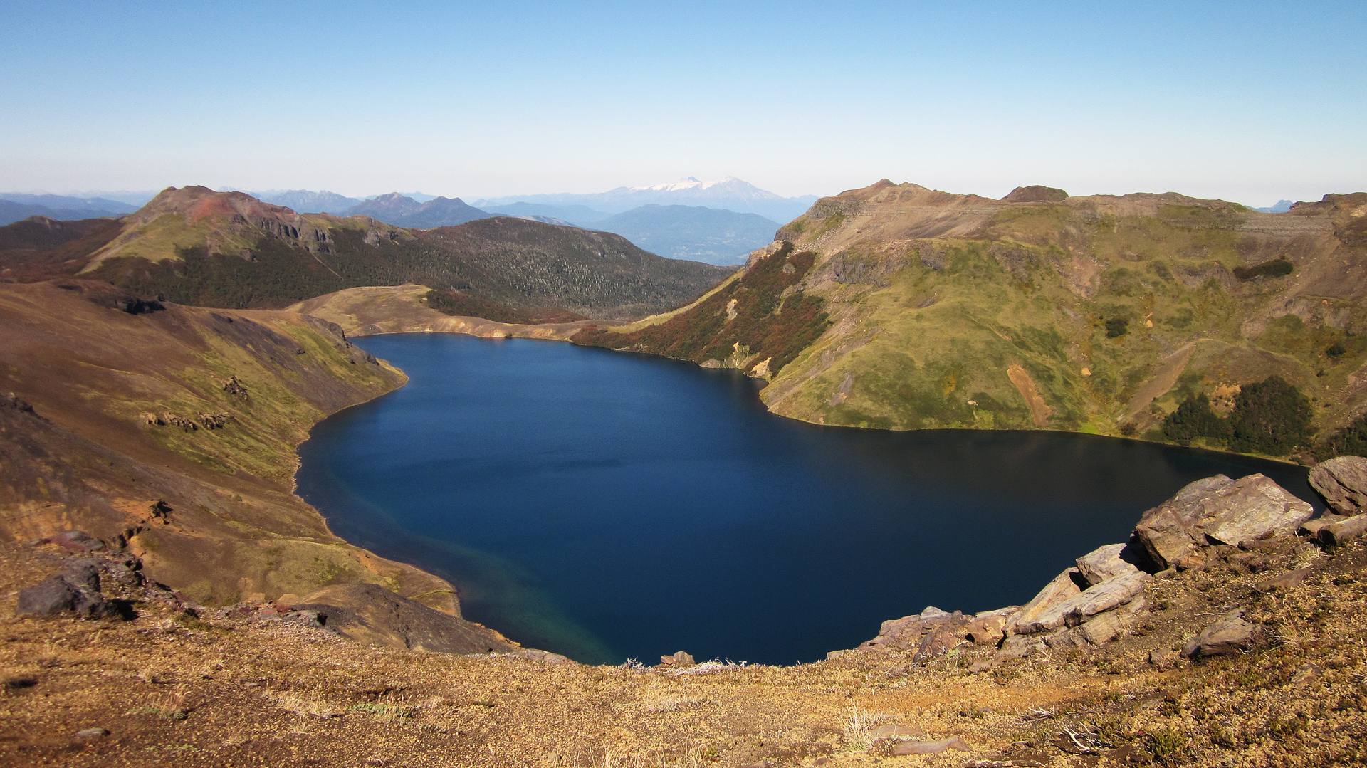 "La Laguna Azul" ubicada hacia el sendero "Los Venados" en el Parque Nacional Villarrica, IX Región de la Araucanía — Chile.